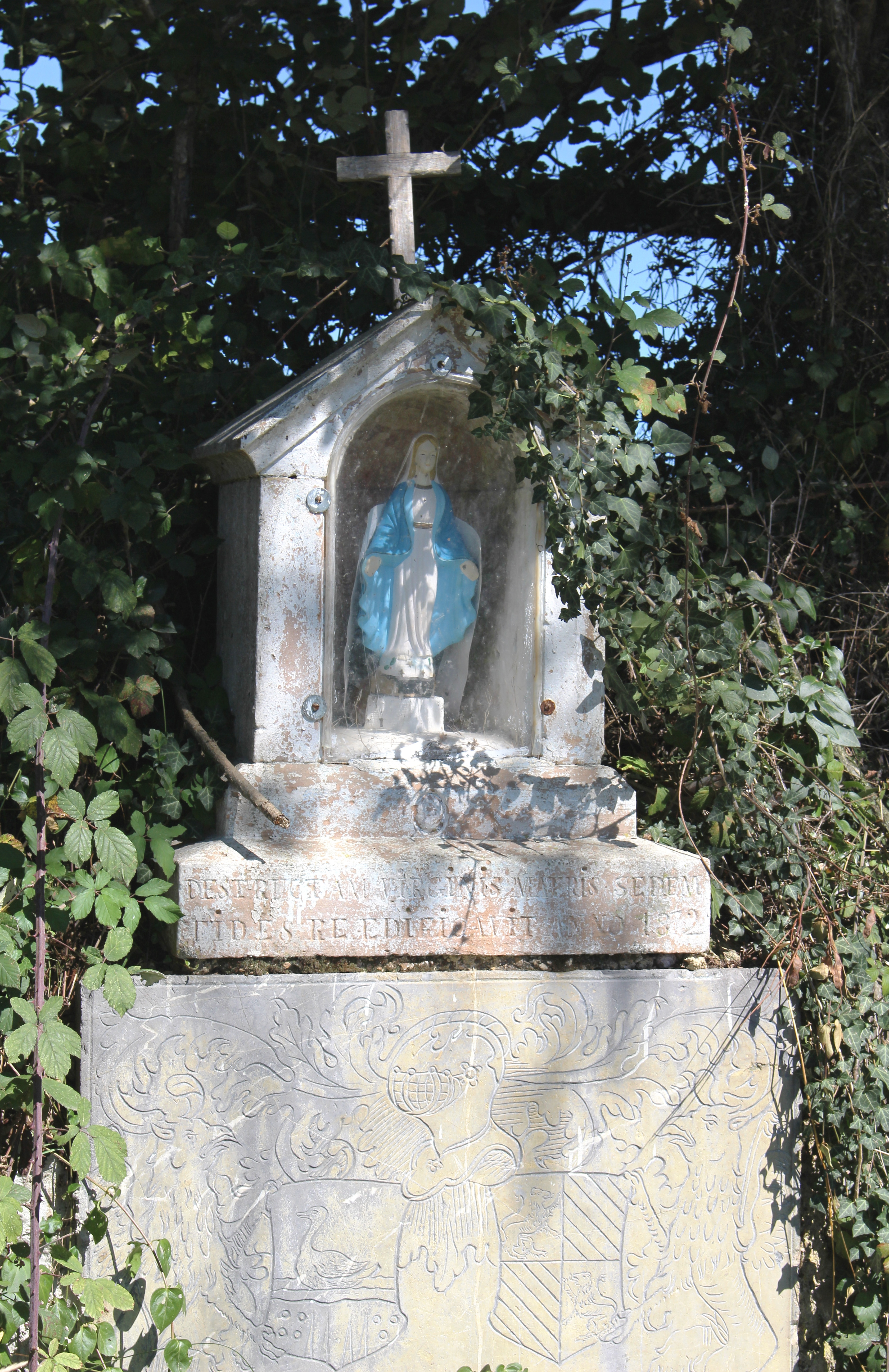 Oratoire de Laran (Hautes-Pyrénées)